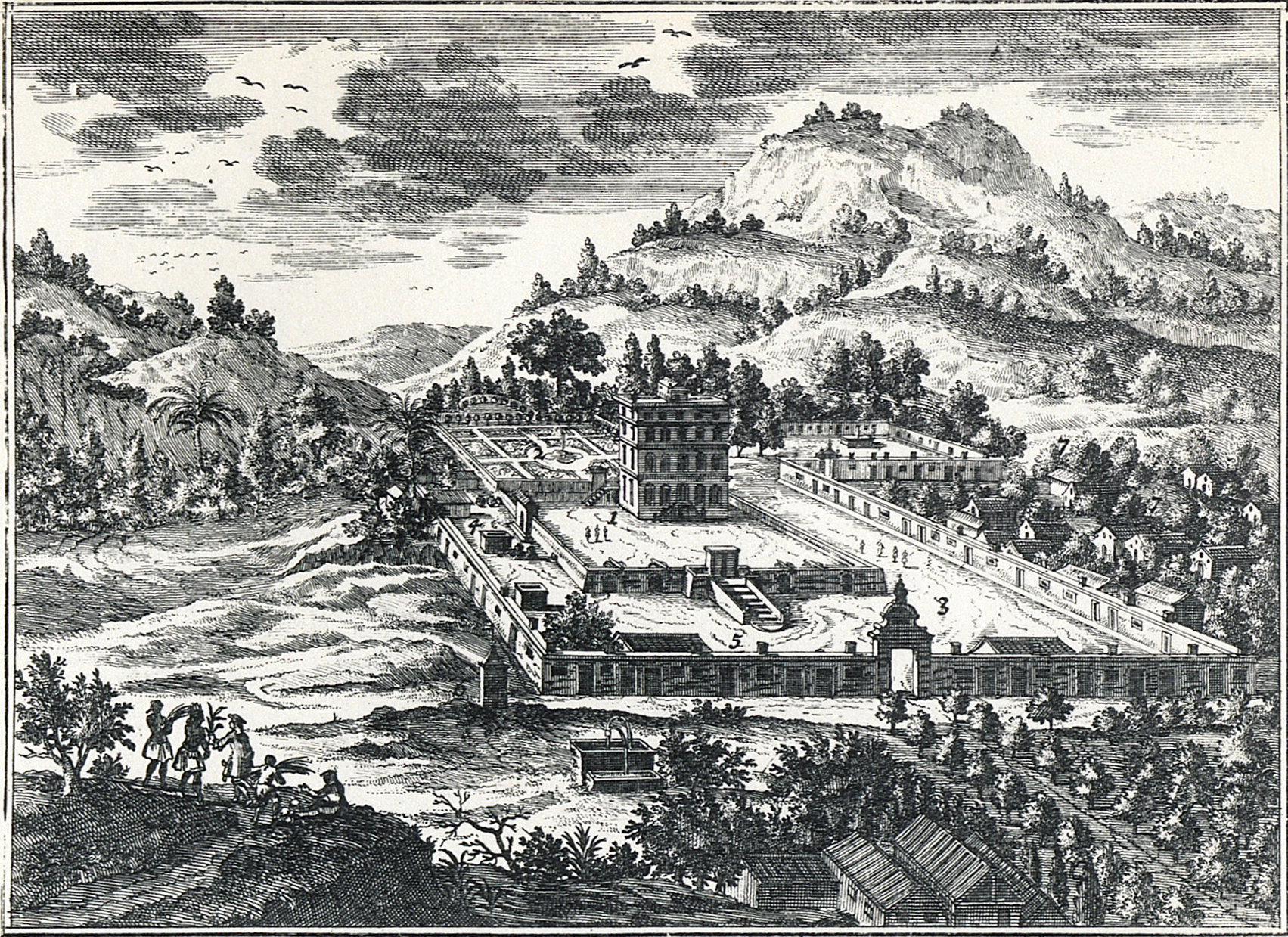 Une partie de l'île de Saint-Christophe avec le château du général (de Poincy). Gravure du XVIIe siècle publiée dans "Voyages aux Isles de l'Amérique (Antilles) : 1693-1705" . Tome 2.